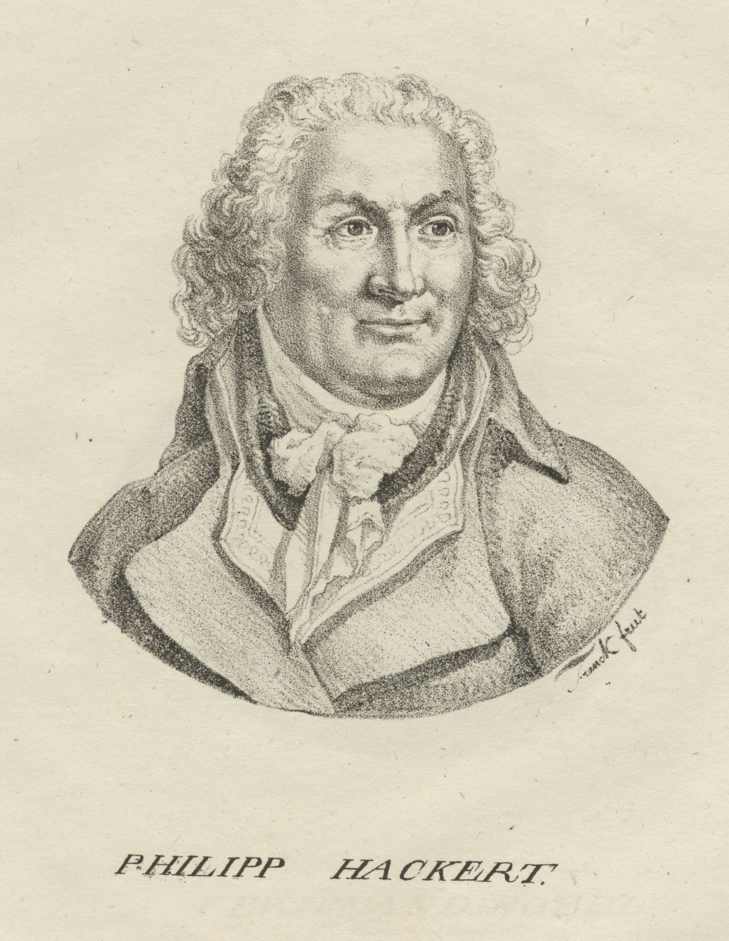 Porträt von Jakob Philipp Hackert